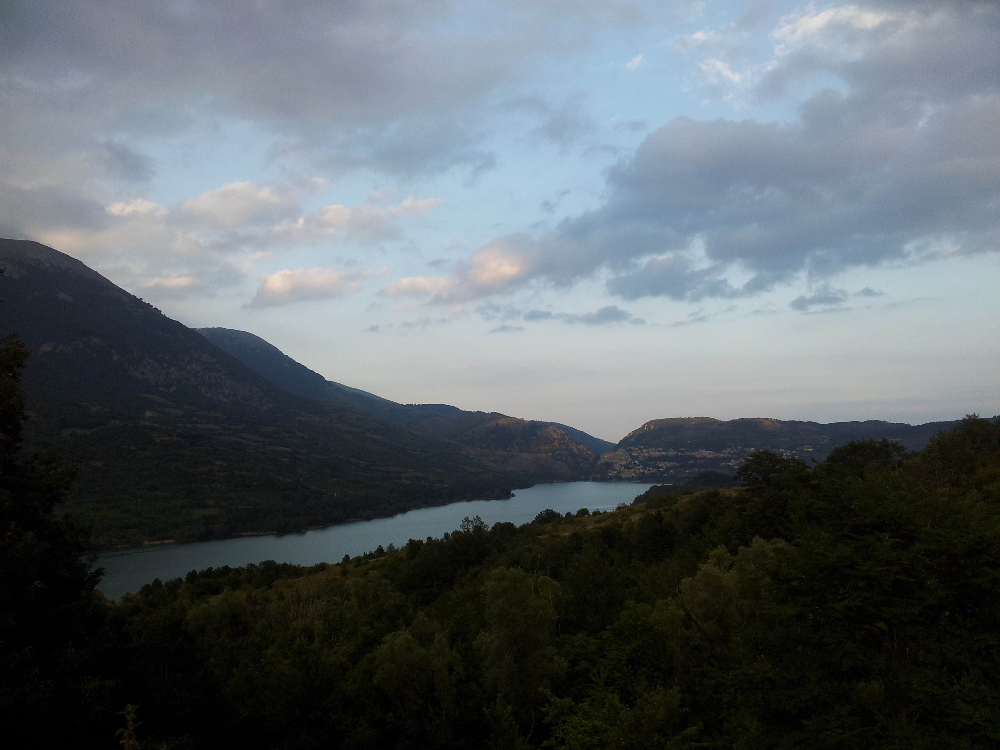 Lago di Barrea This is a photo of a monument which is part of cultural heritage of Italy.